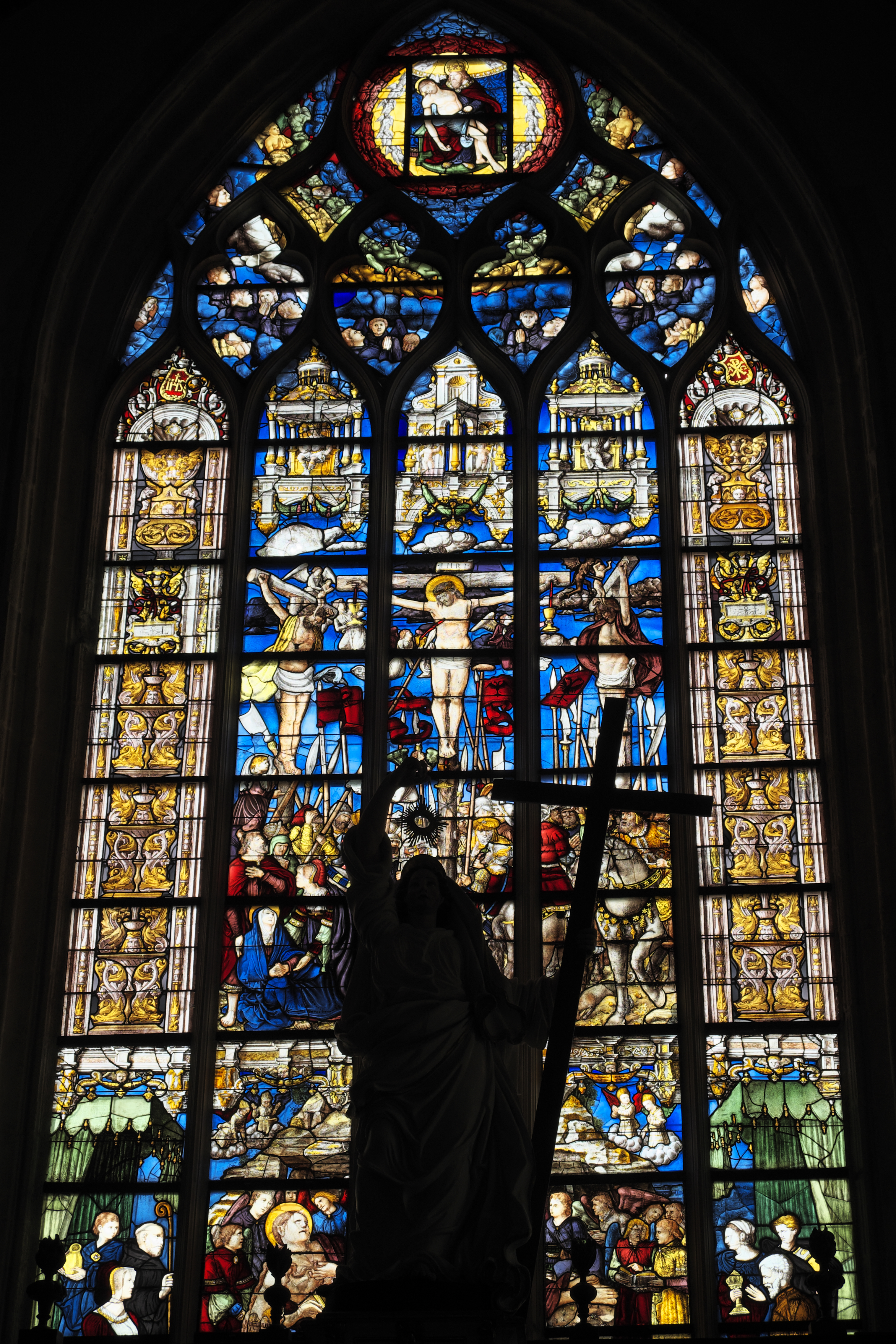 Kreuzigungsfenster in der Kirche Sainte-Marie-Madeleine, der ehemaligen Stiftskirche Notre-Dame, in Champeaux im Département Ille-et-Vilaine (Region Bretagne/Frankreich), Bleiglasfenster aus der ersten Hälfte des 16. Jahrhunderts; Darstellung: Kreuzigung Christi, unten das Stifterpaar Louise de Goulaine und Guy d'Épinay; im Maßwerk: Gnadenstuhl